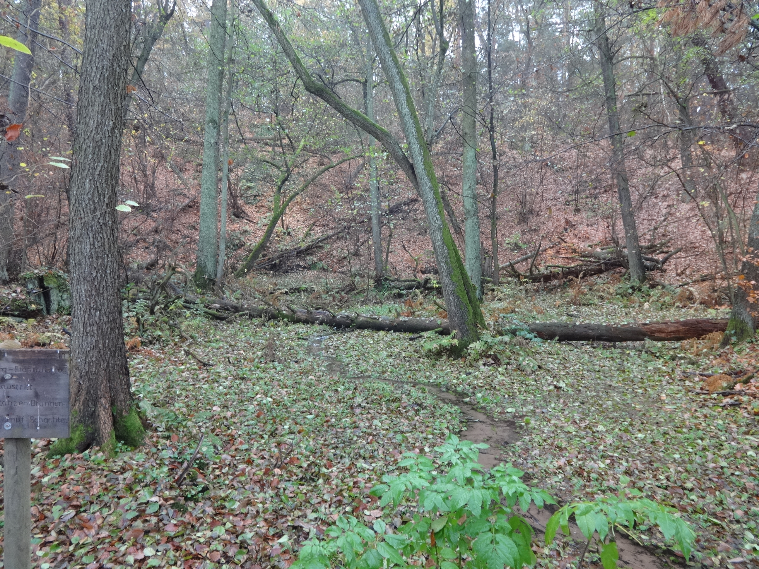 Tornower See in Teupitz, Landkreis Dahme-Spreewald, Brandenburg